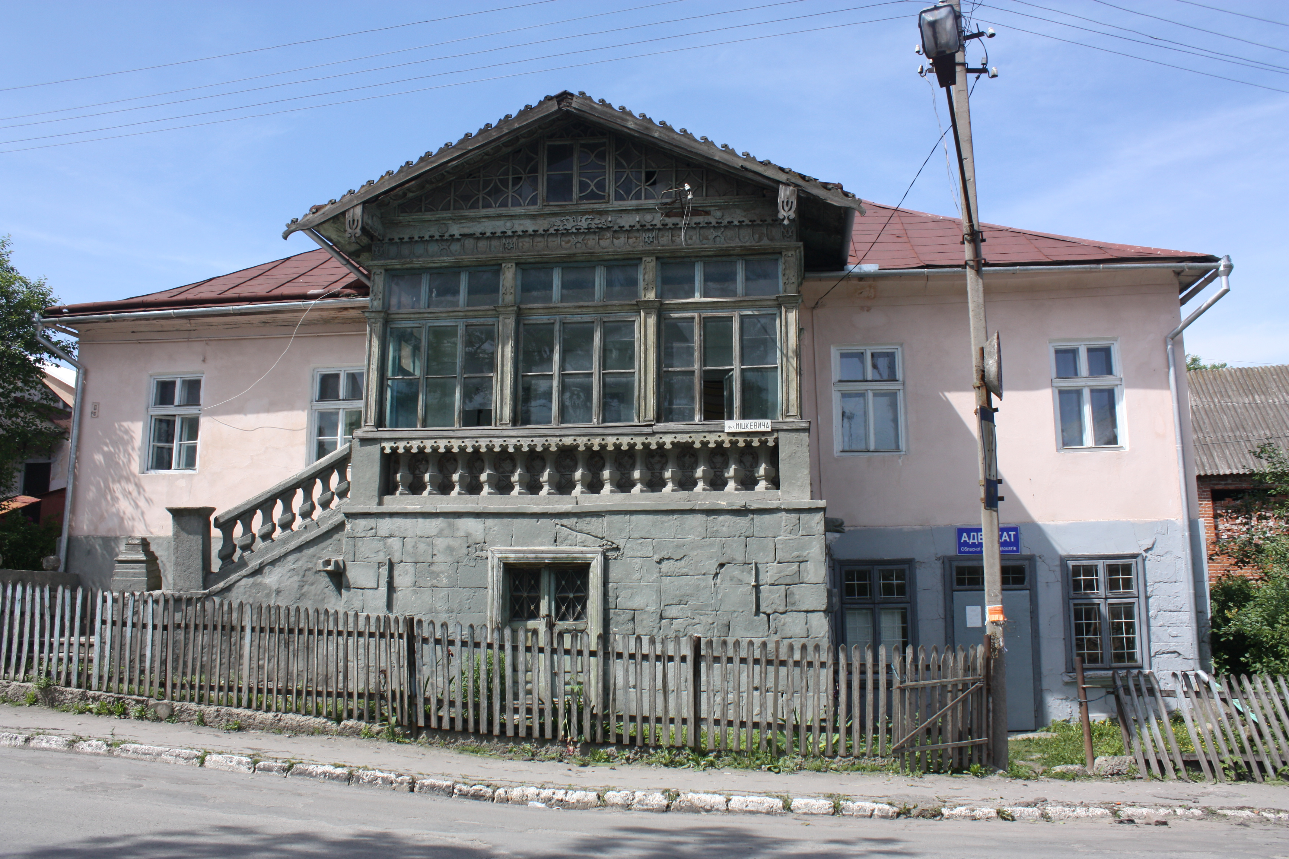 Podhajce - Dom jednej z byłych właścicielek miasta Marceliny Czartoryskiej, uczennicy Fryderyka Chopina